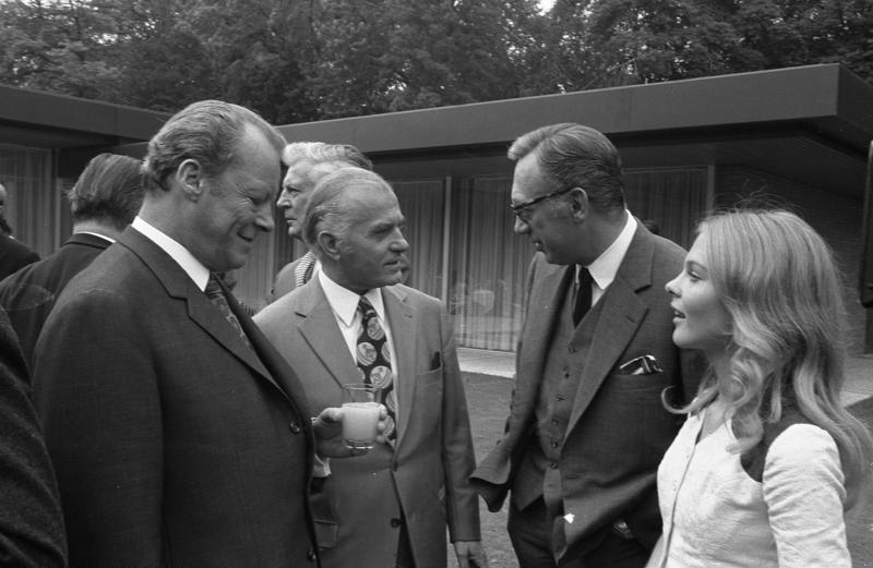 Bundeskanzler Willy Brandt empfängt Filmschauspieler